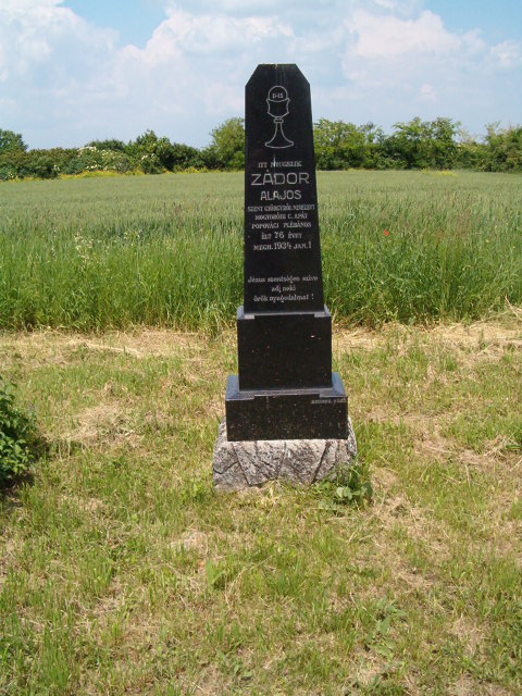 A kép Zádor Alajos egykori baranyabáni plébánosnak a a temetőbejárattól kb. 50 méterre jobbra lévő síremlékét mutatja.